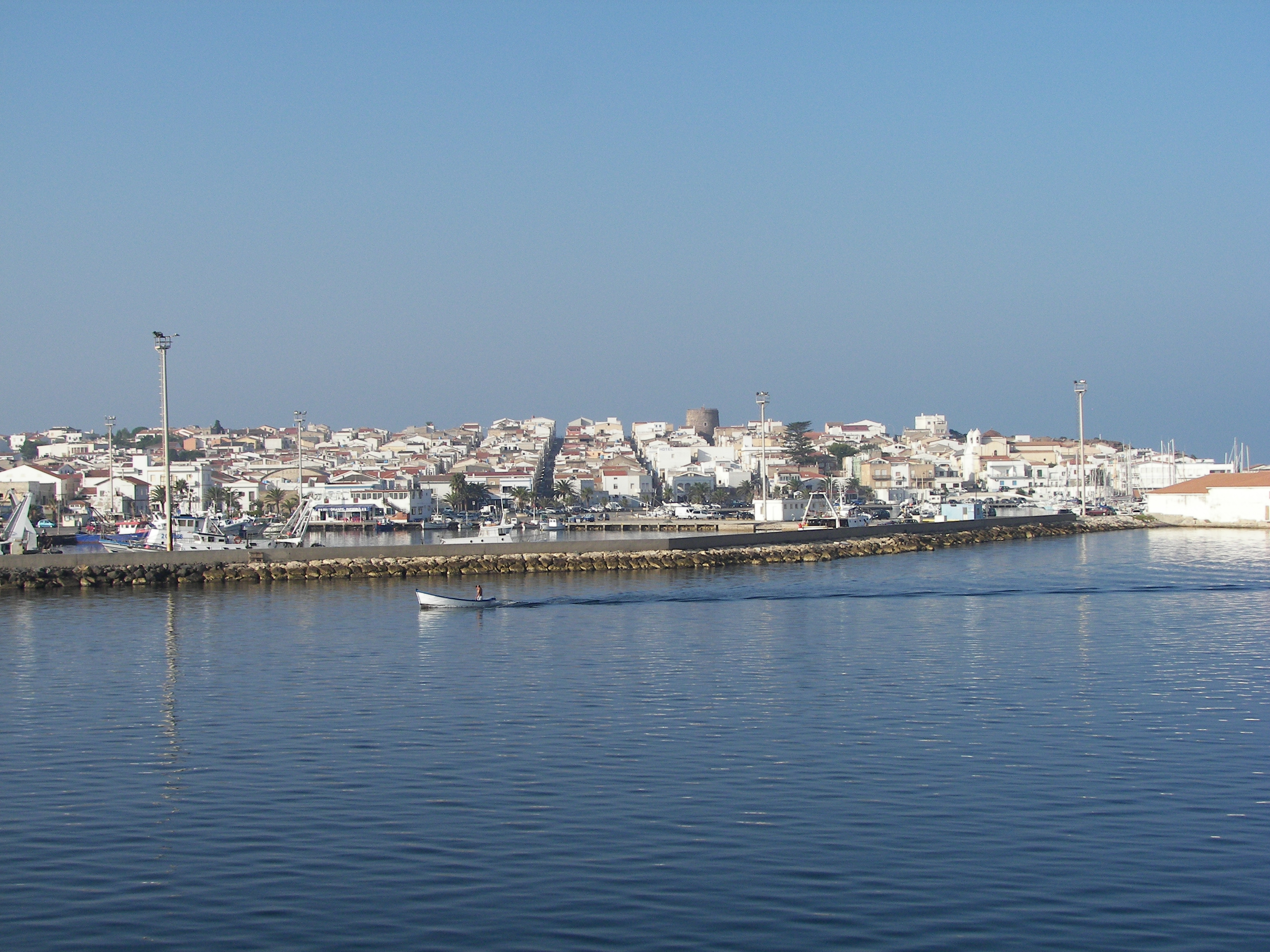 Calasetta (CI)